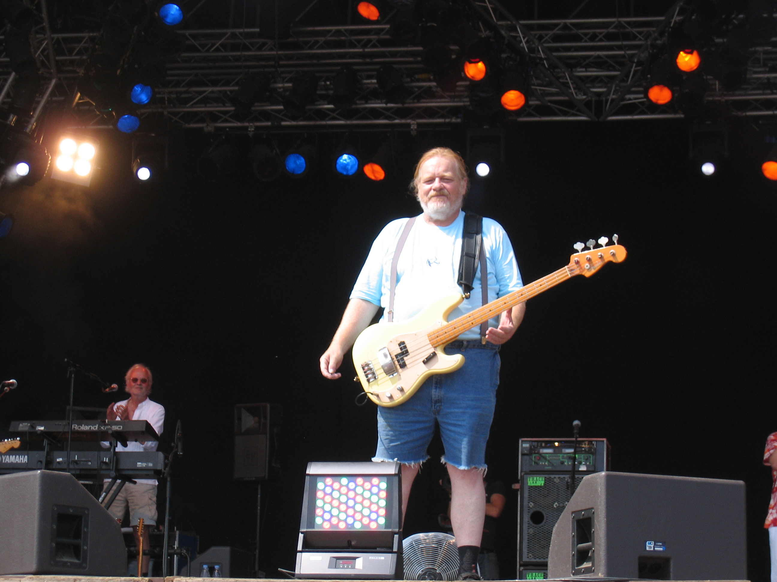 Flemming Bamse Jørgensen at Langelandsfestivalen 2006. Picture taken by User:Lhademmor